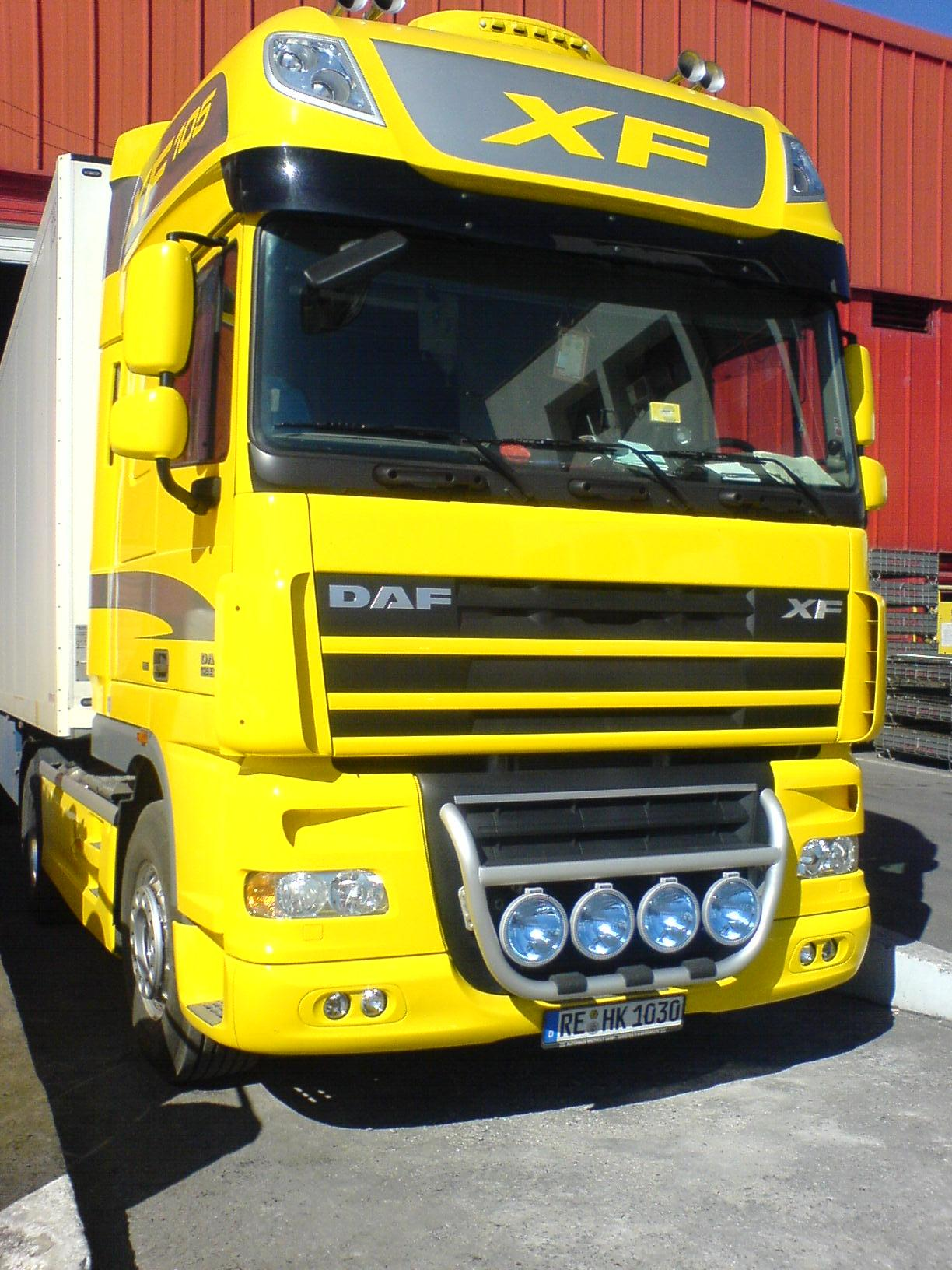 Truck DAF XF